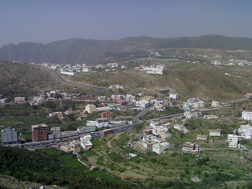 Panorama.